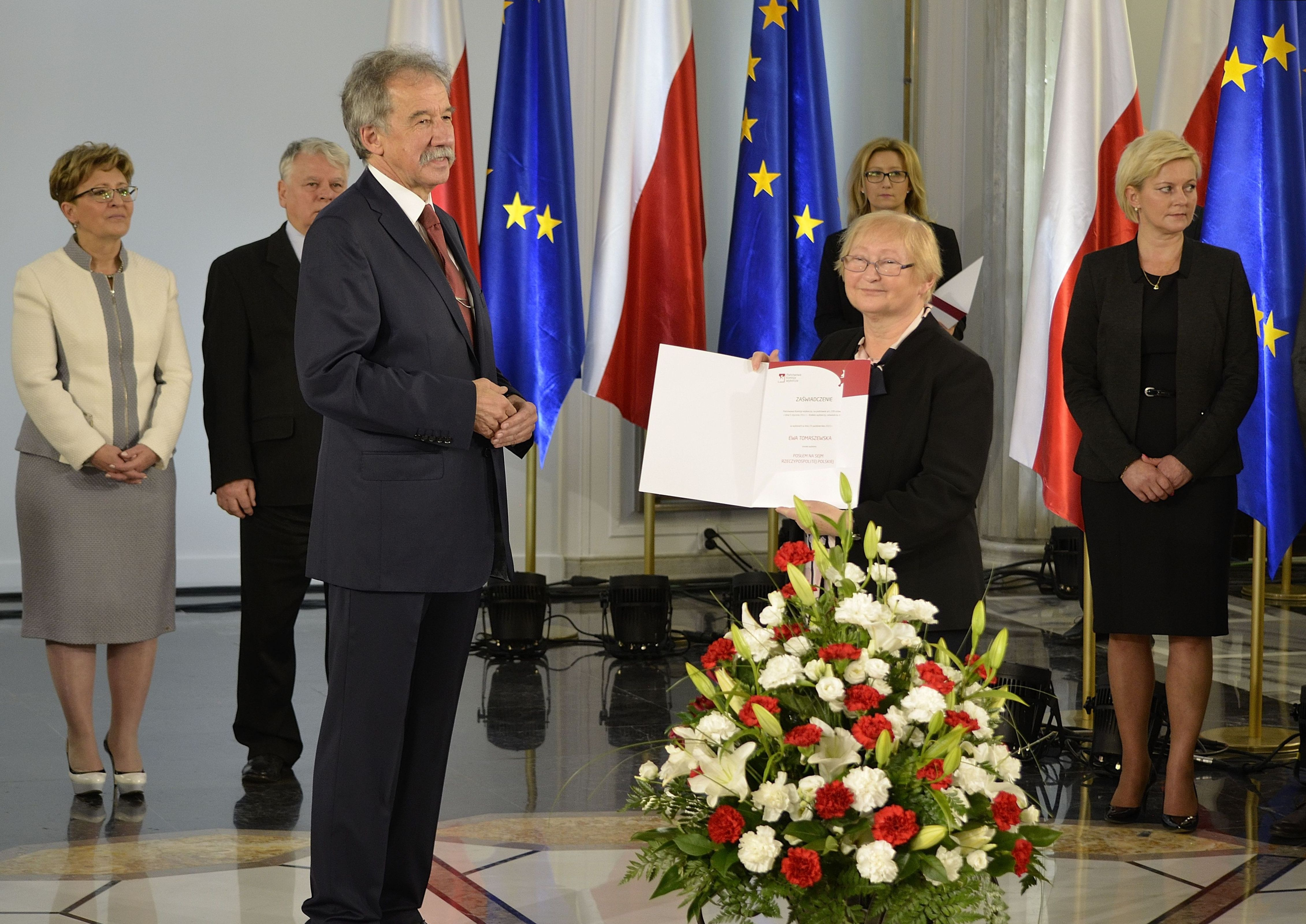 Posłanka Ewa Tomaszewska podczas uroczystości wręczenia zaświadczeń o wyborze nowo wybranym posłom w Sali Kolumnowej Sejmu